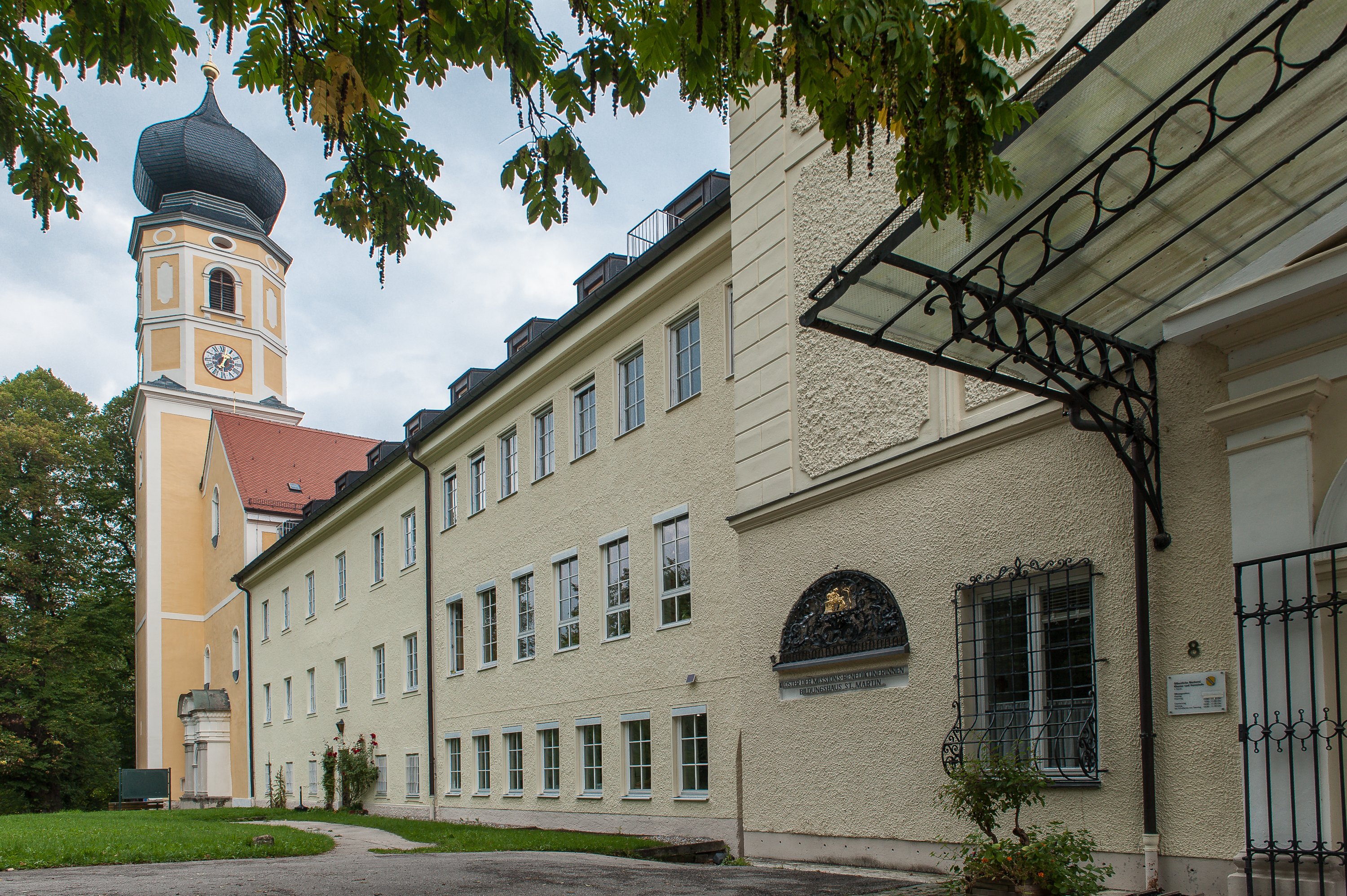 Kloster Bernried, Starnberger See